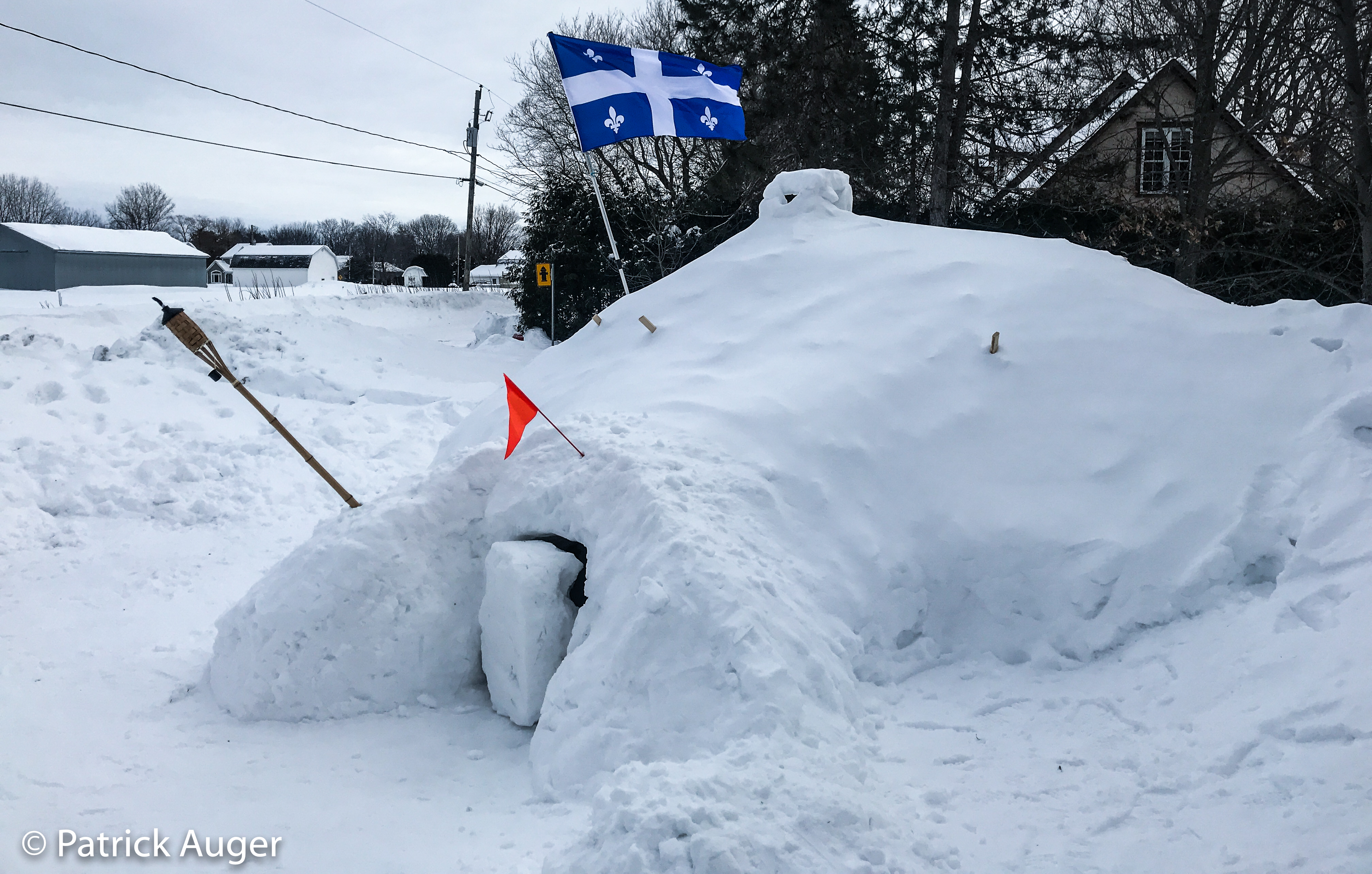 Vue extérieure d'un quinzhee